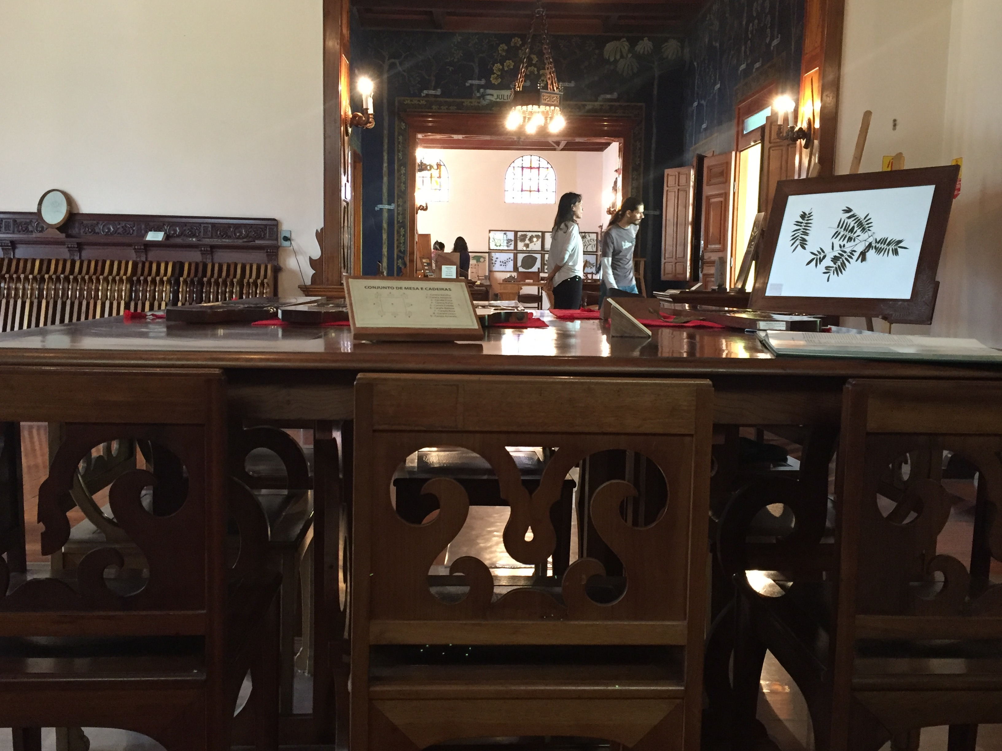 Mesa com design exclusivo, cada cadeira é feita com um tipo de madeira diferente, todas da família da canela